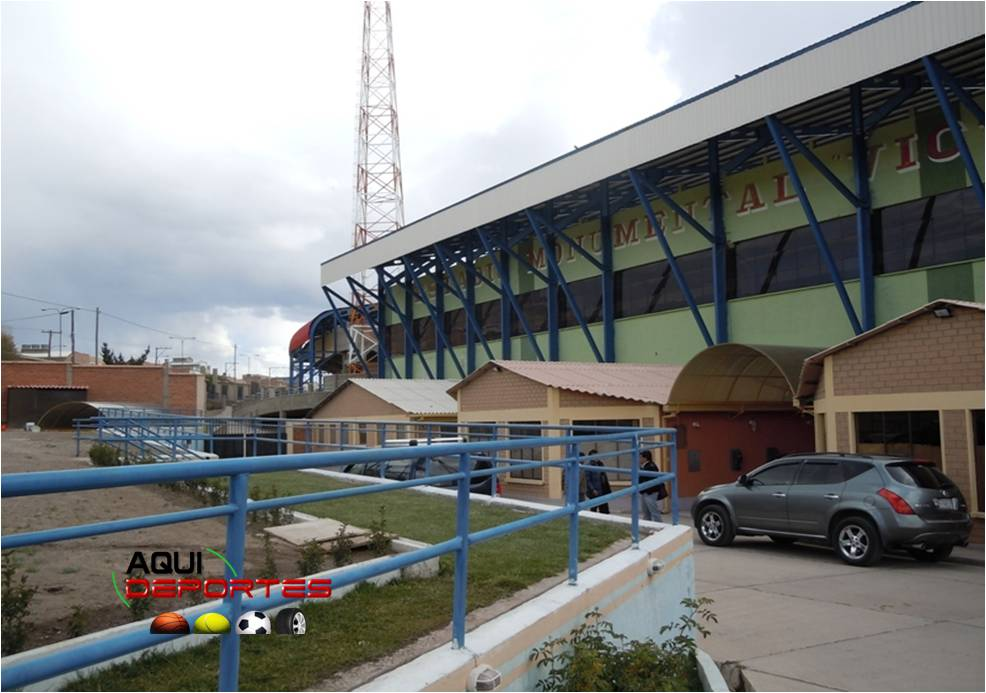 Area Restringida